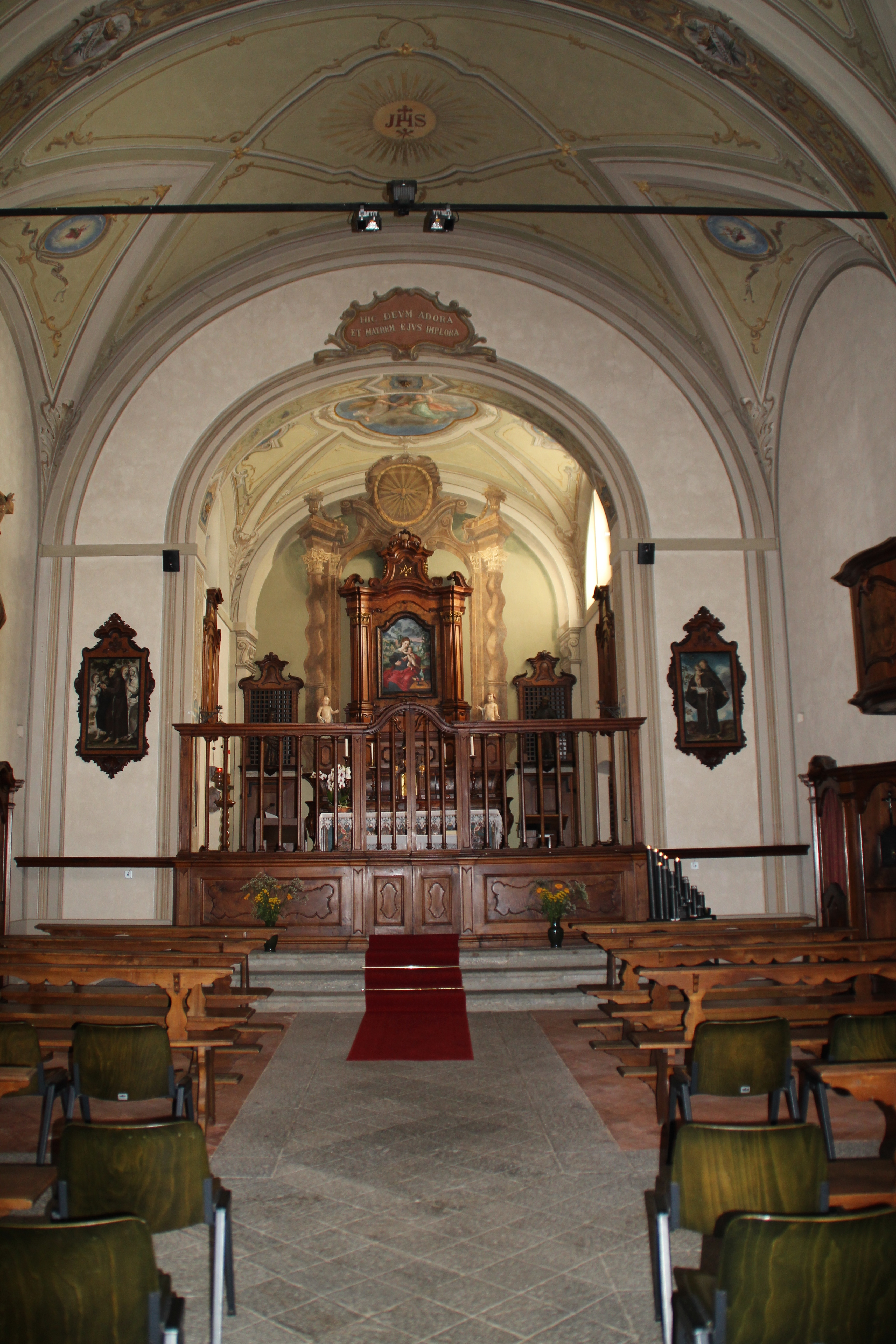 Kloster Bigorio Klosterkirche